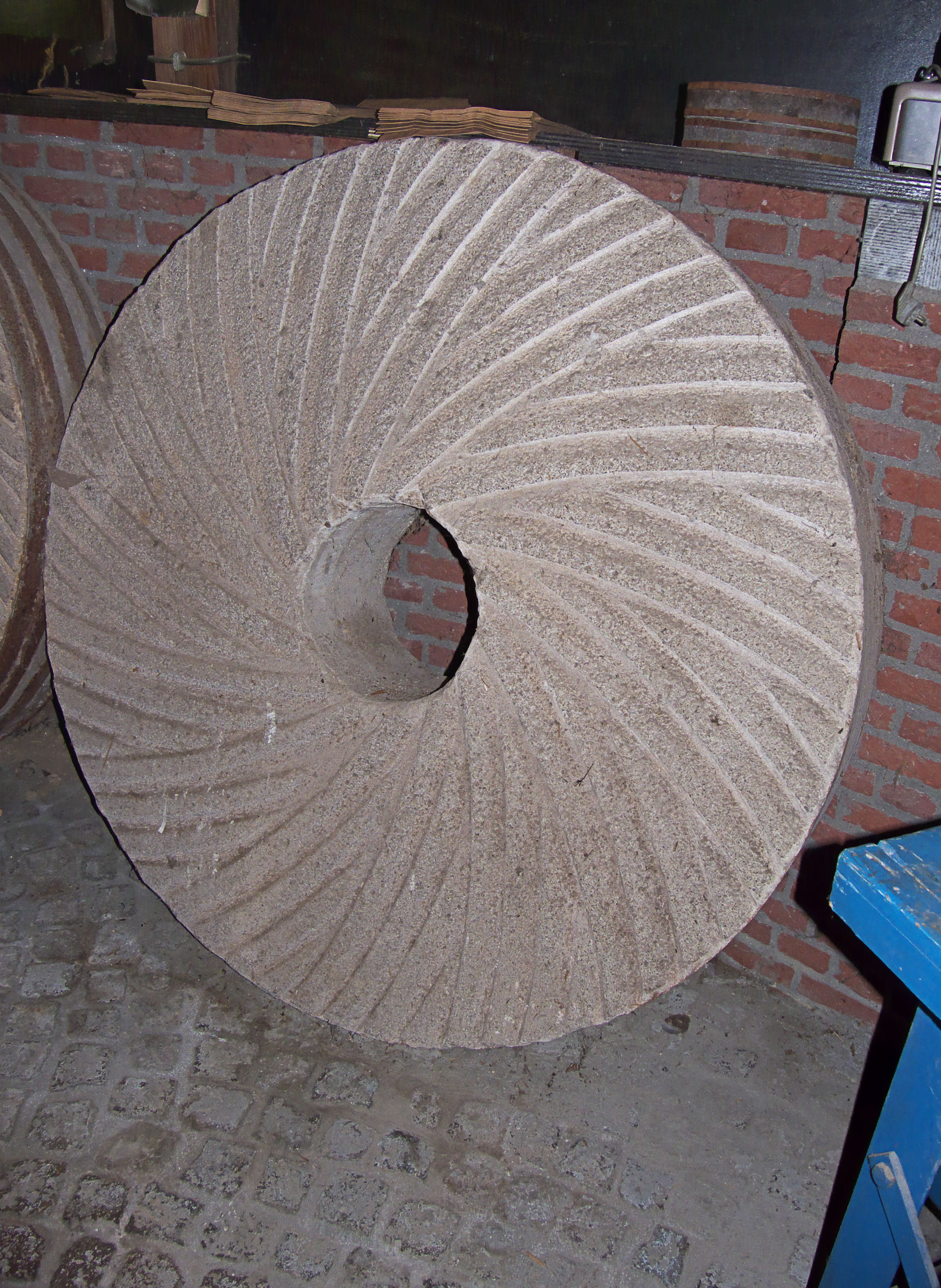 Molen De Bijenkorf, molensteen, ligger